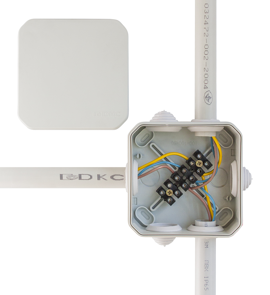 Для захисту кабельних зєднань у приміщеннях з високим рівнем пилу обо вологи використовуються відгалужувальні коробки зі ступенем захисту IP55 та спеціальними вводами.